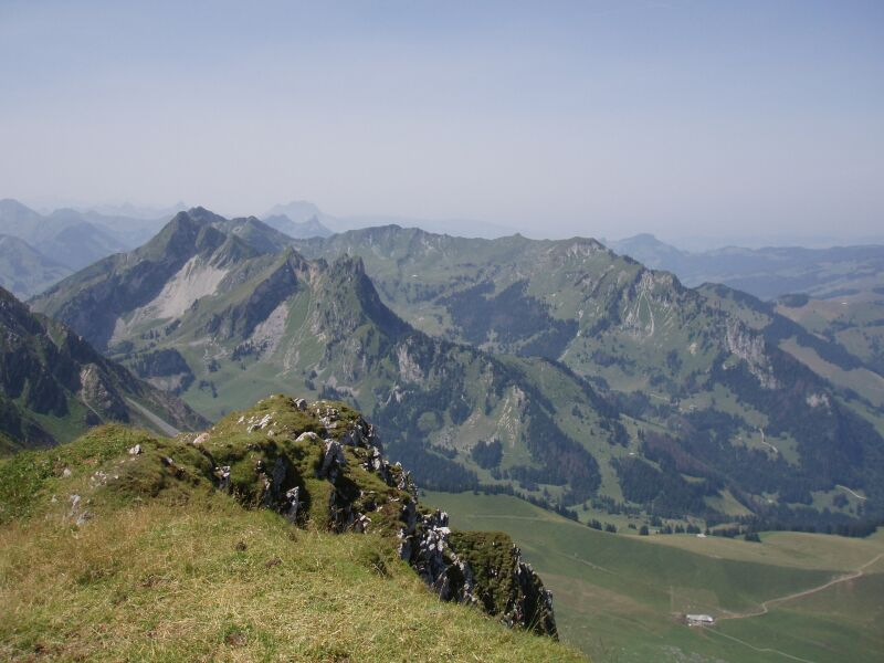 Freiburger Alpen, Blick von der Kaiseregg nach Südwesten zum Schopfenspitz und Breccaschlund